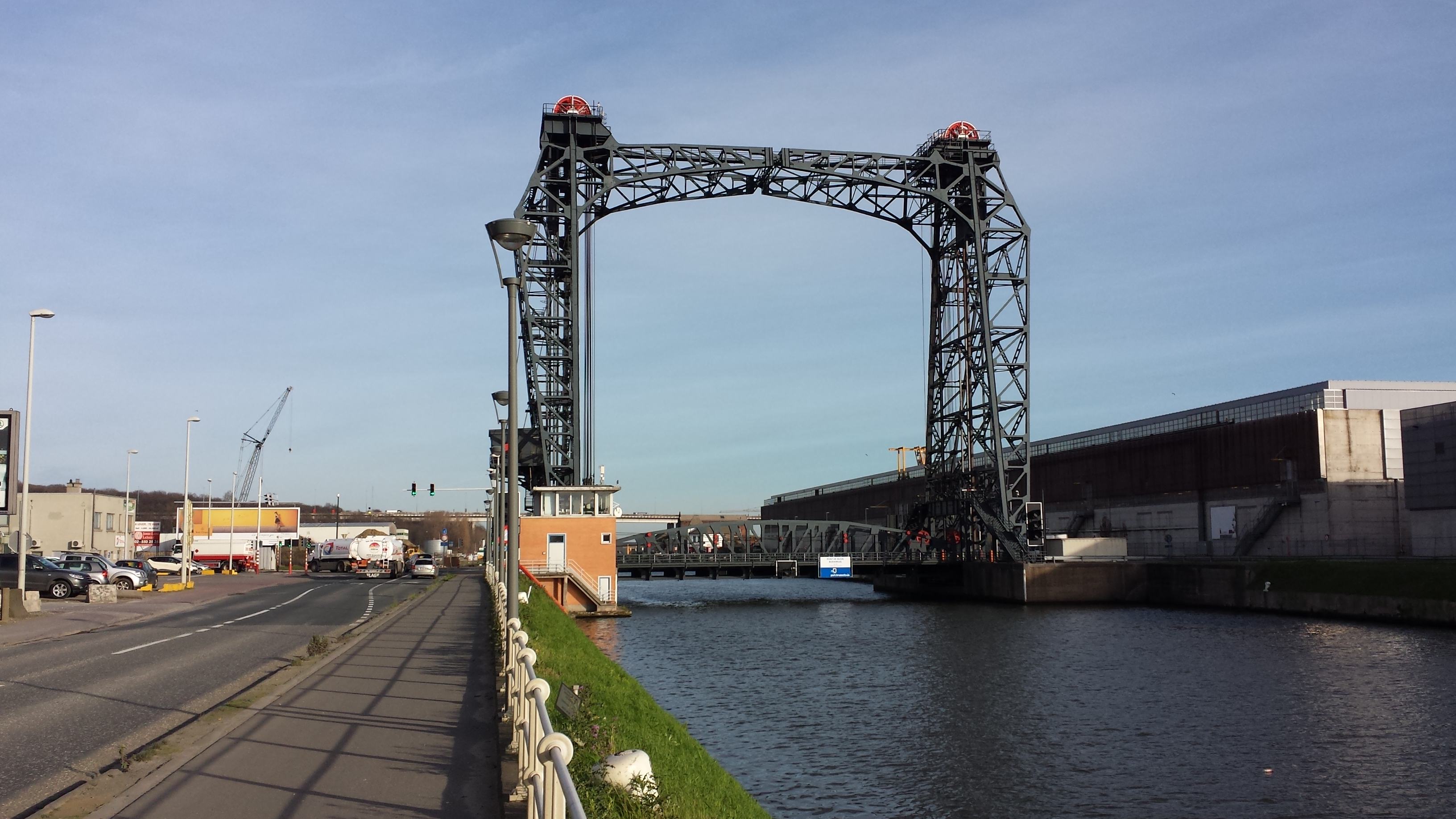 El Puente de Buda en Bruselas, en posición de paso del tráfico rodado